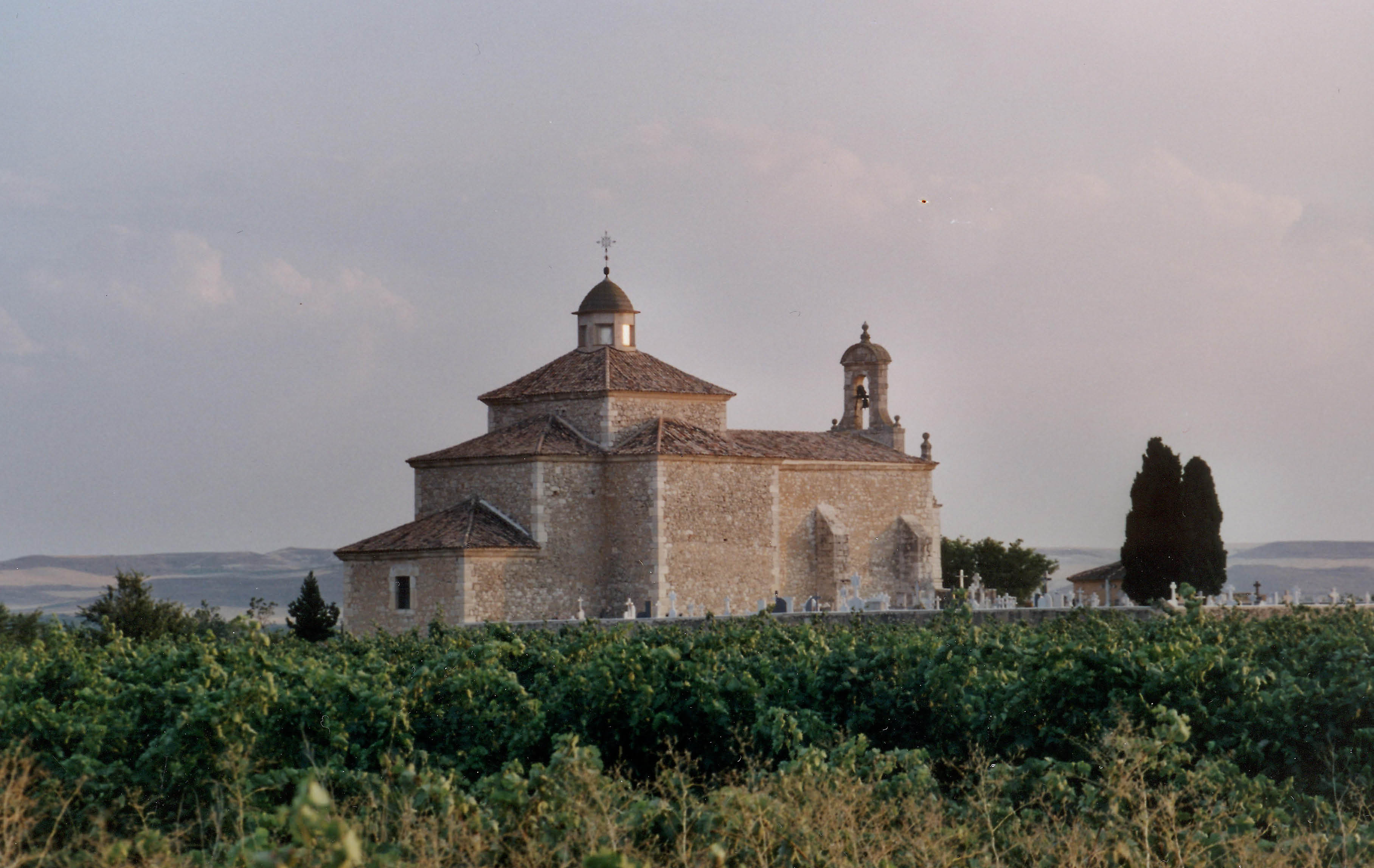 vista de la ermita desde el camino